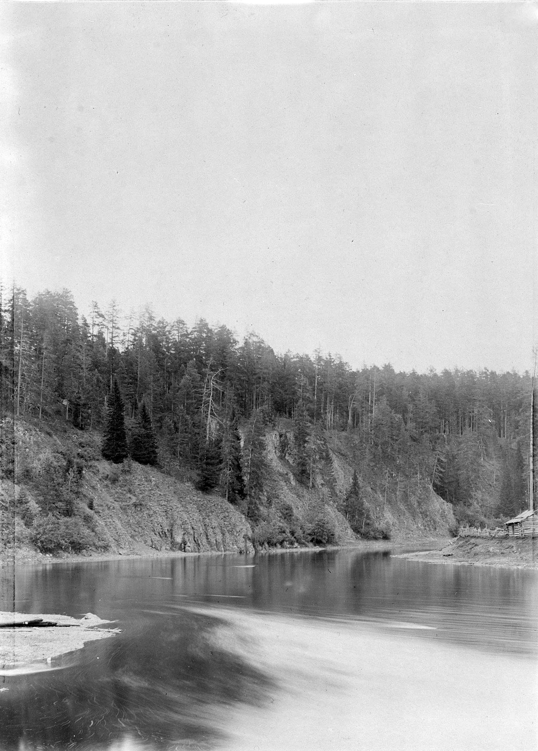 Река Лобва. Восточный Урал. 1890.